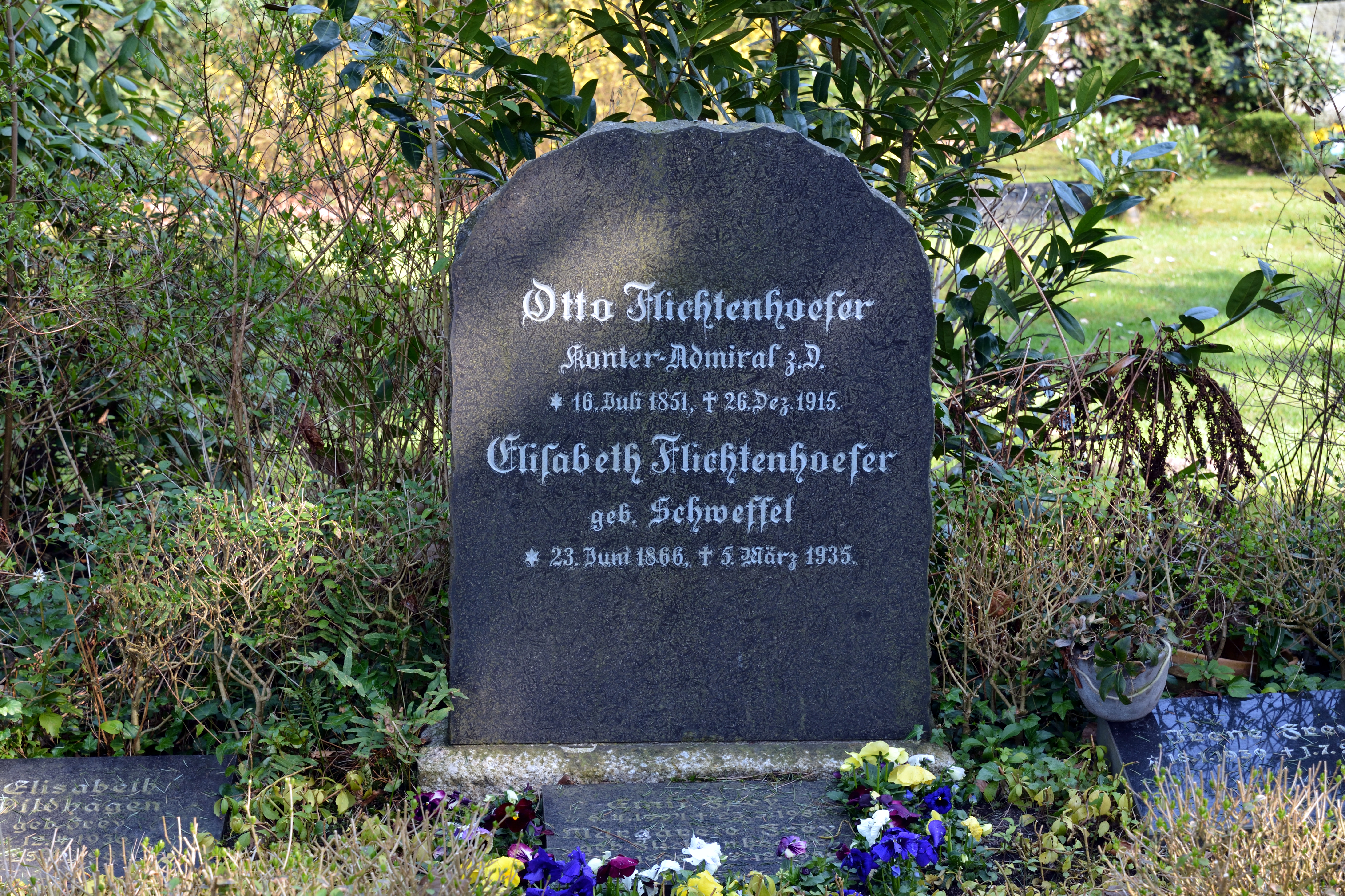 Impressionen vom Nordfriedhof in Kiel. Grab von